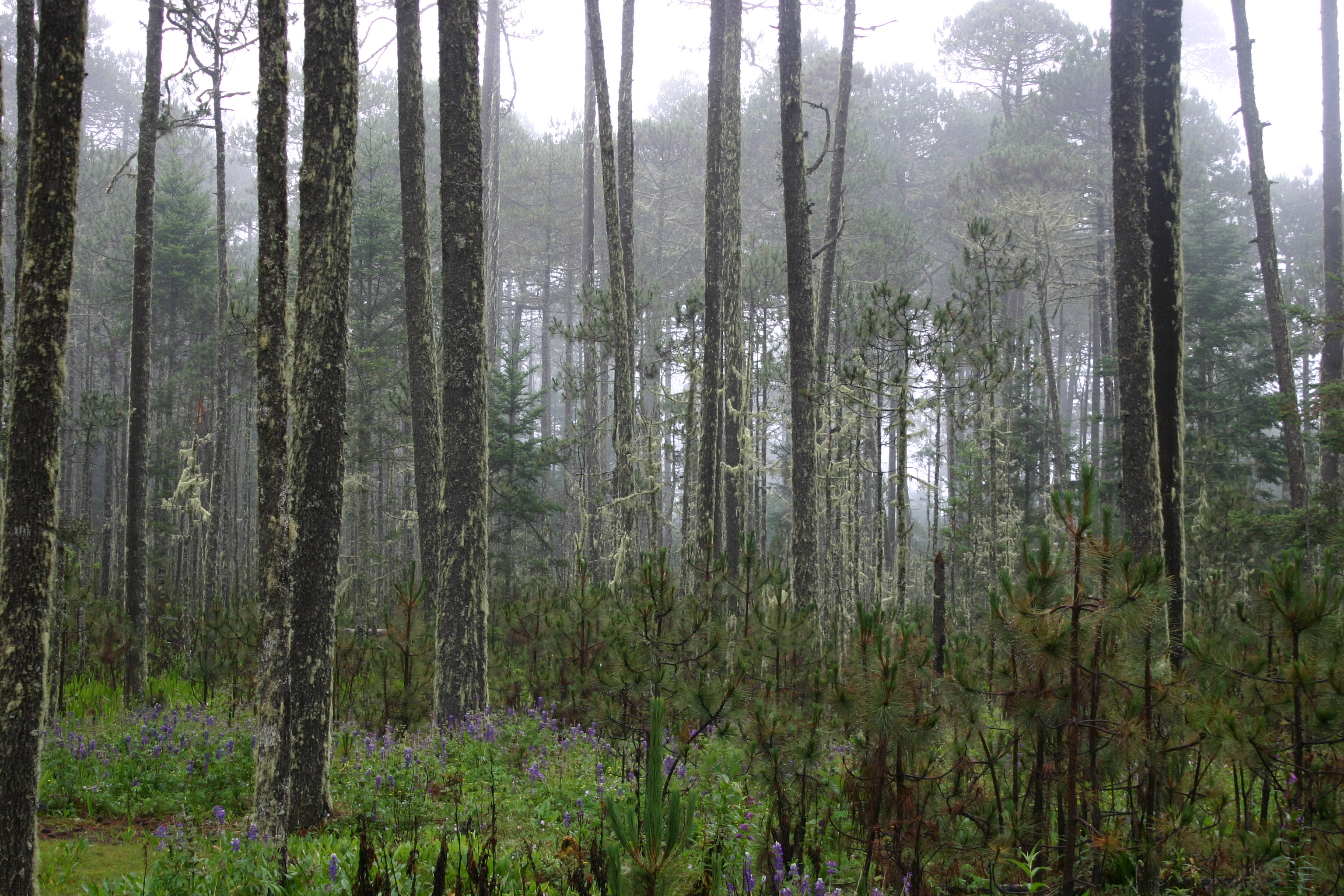 Bosque Templado de Pino en la Carretera entre San Isidro Llano Grande y San Miguel Cajonos, Sierra Juarez, Oaxaca, Mexico